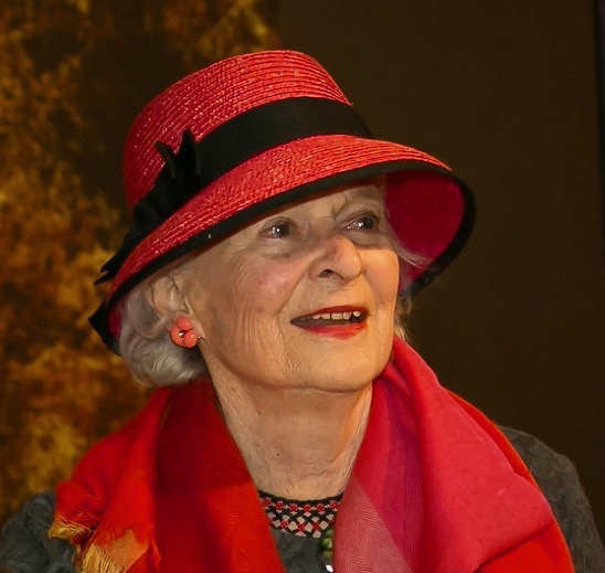 Ruth Greenfield, pianista, profesora, activista y educadora en Miami, Florida desde 1951